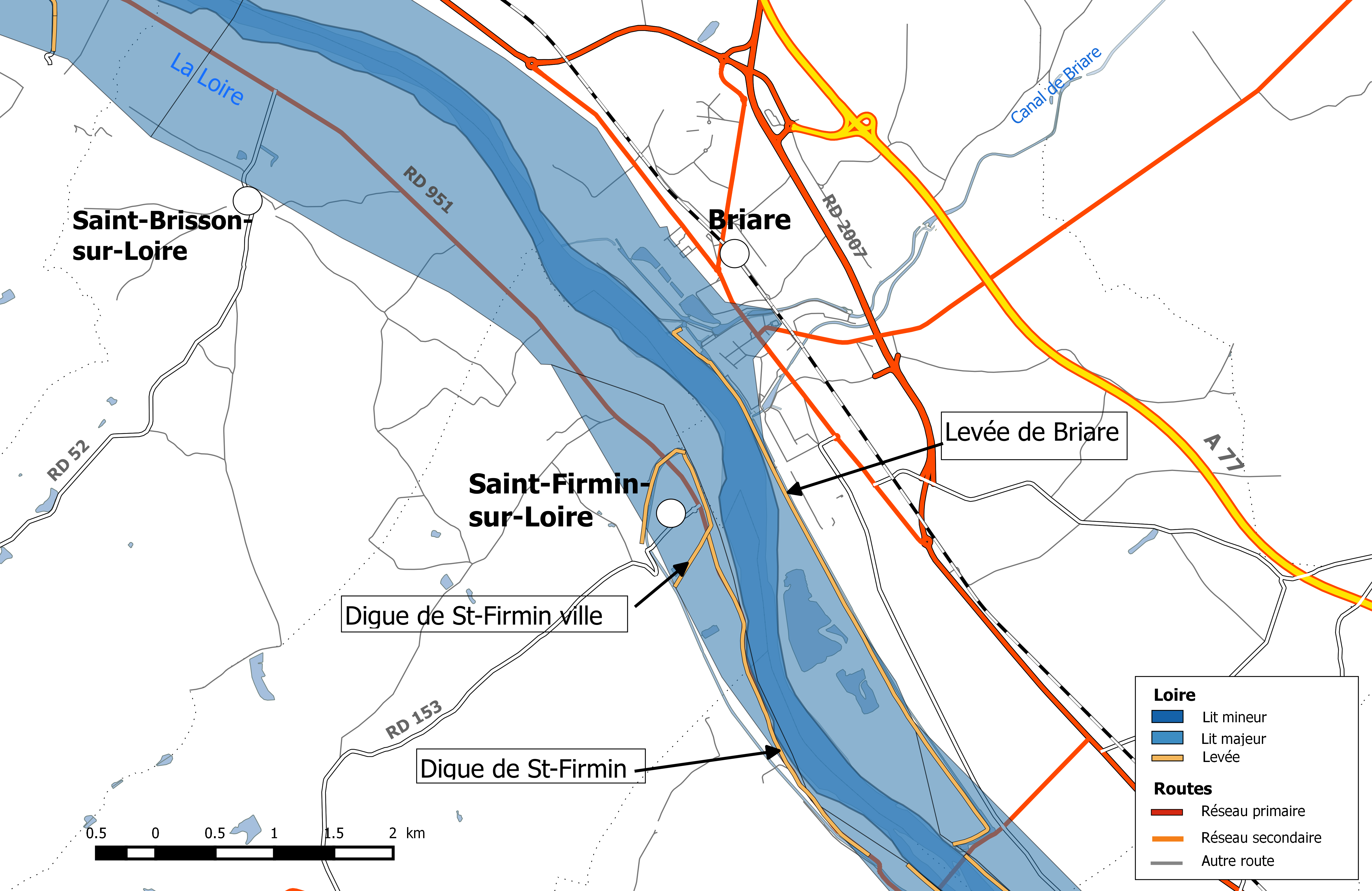 Système d'endiguement de la Loire dans le département du Loiret. Val de Briare.